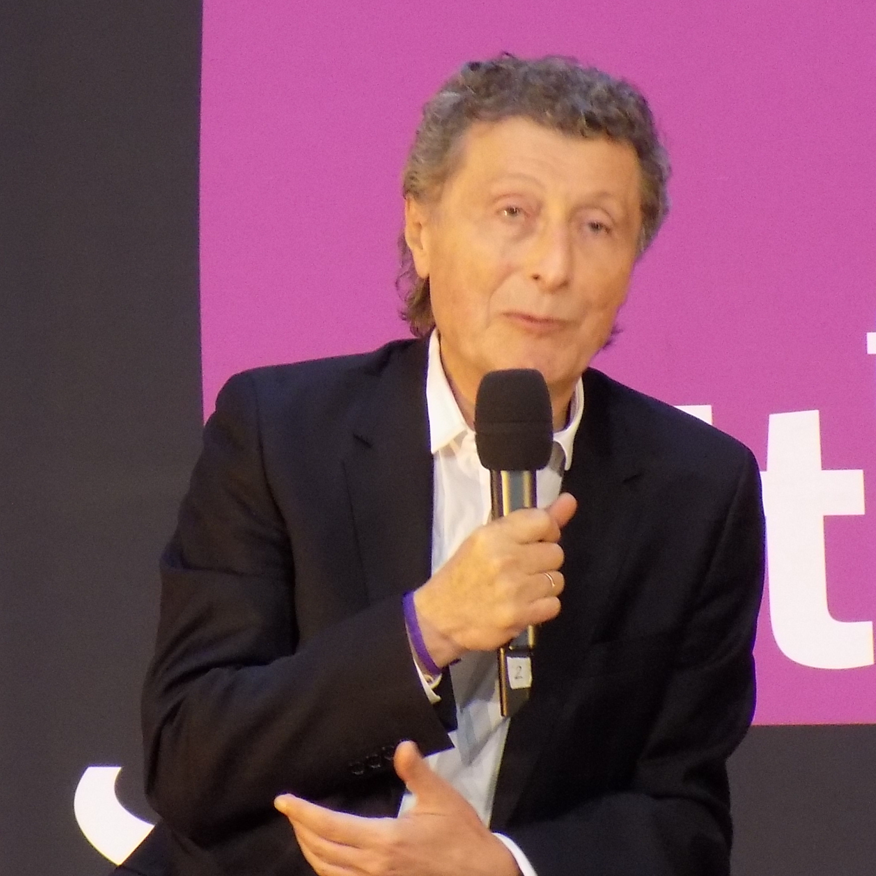 Willy Rozenbaum lors du forum « L’année vue par… les sciences » organisée par France Culture le 14 février 2015